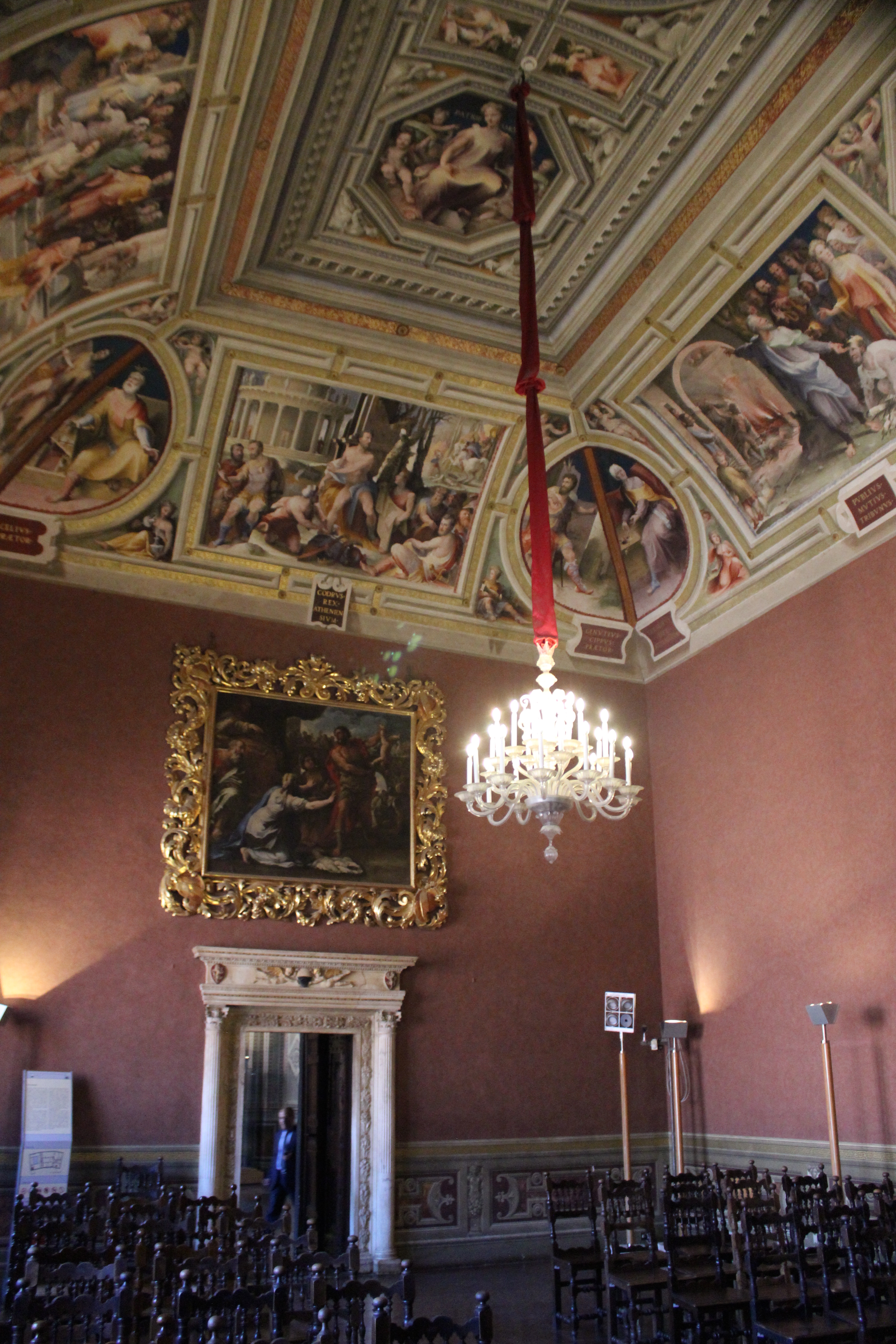 Siena. Palazzo Pubblico. Frescos de Domenico Beccafumi.